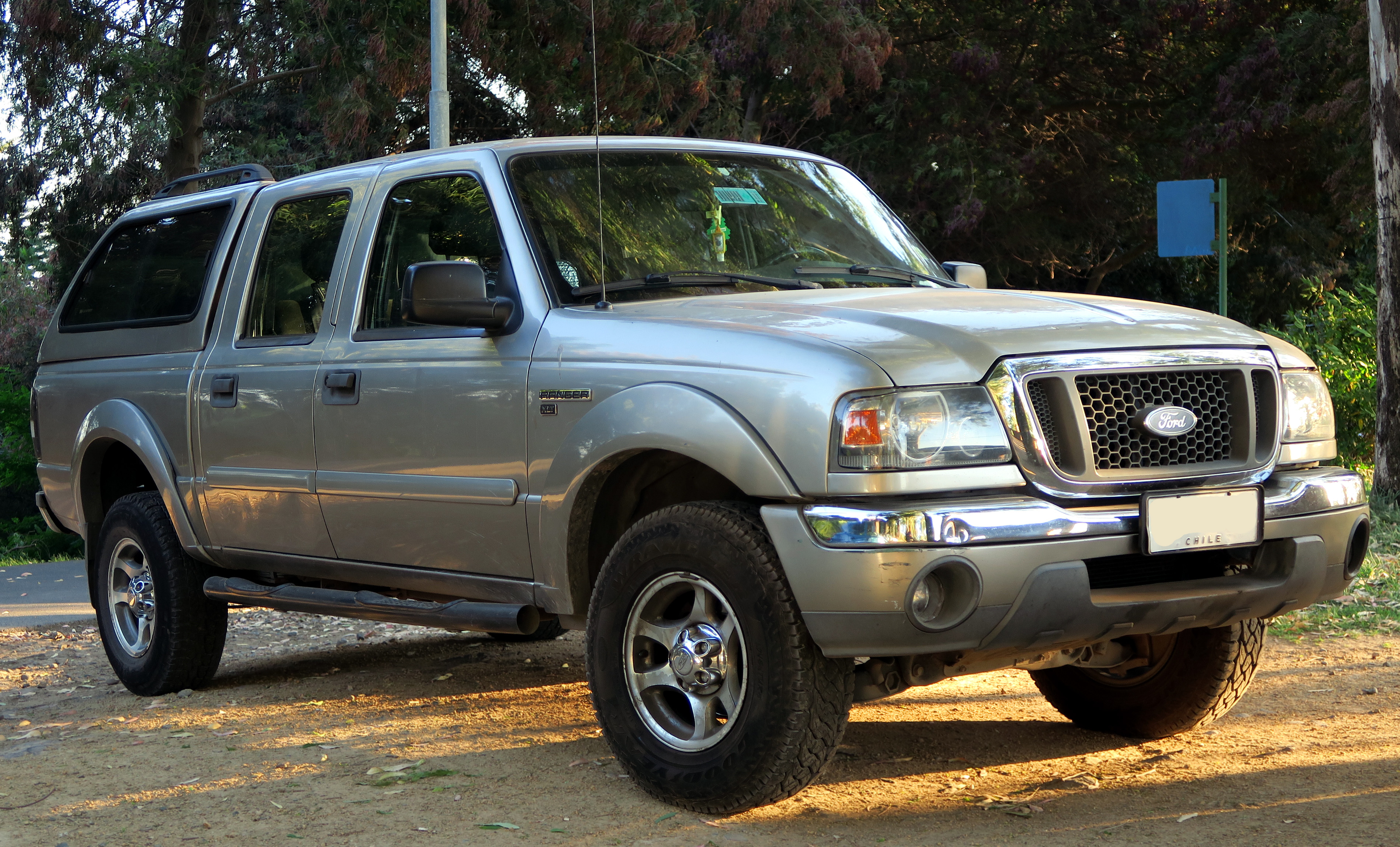 Ford Ranger 2.3 XLT 2009